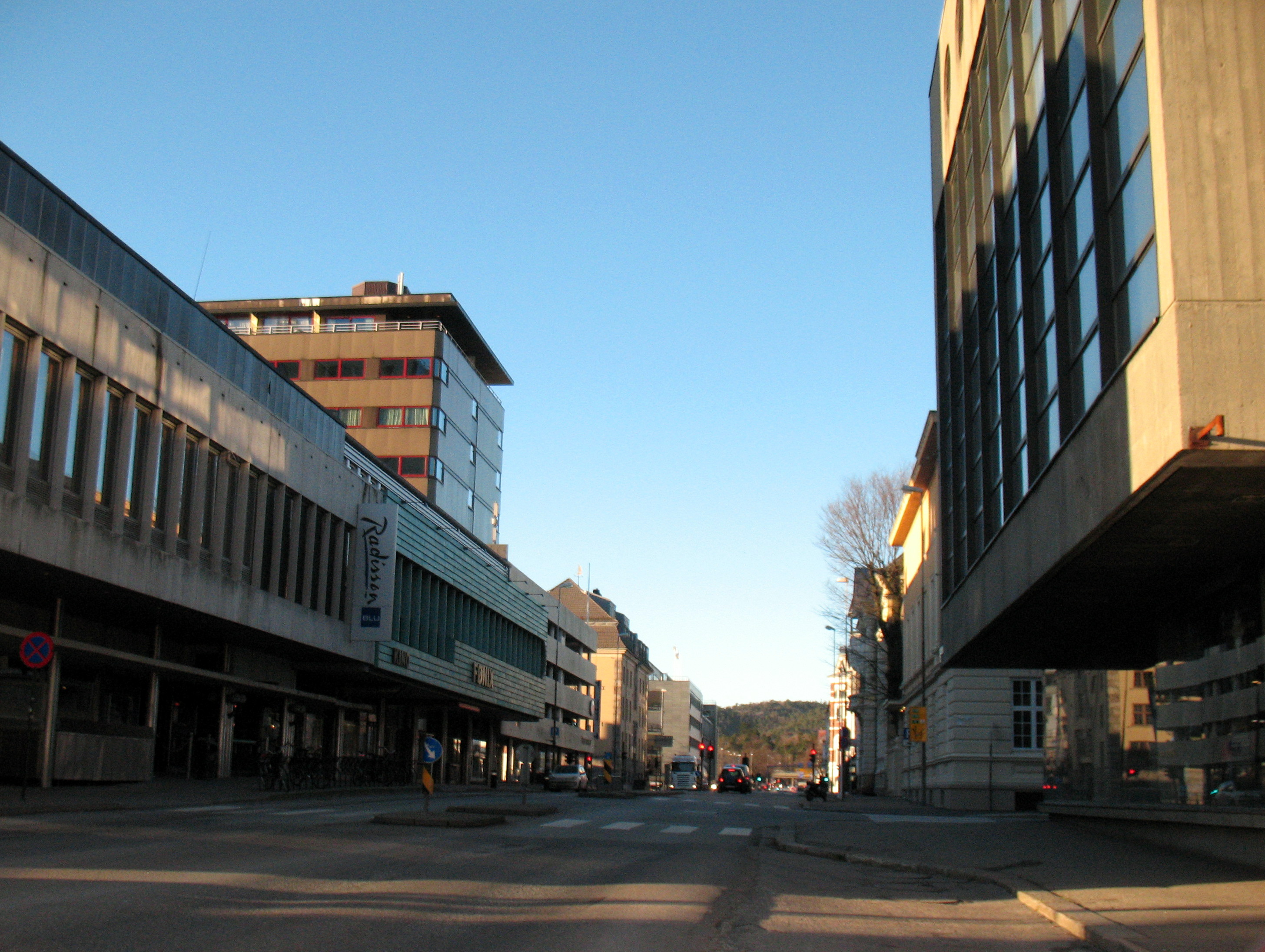 Vestre Strandgate i Kristiansand fra Caledonien hotel / Agder teater mot nordvest.